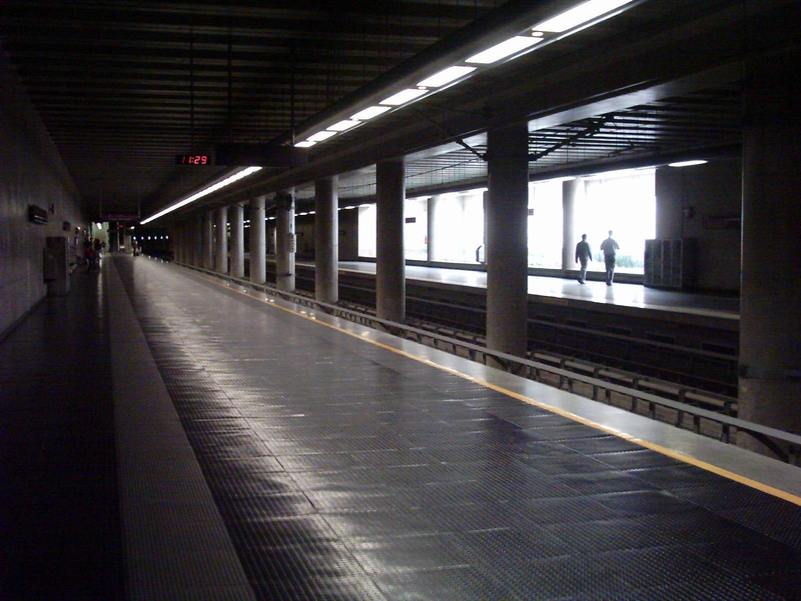 Estação subterrânea do Largo Treze - linha 5 Lilás